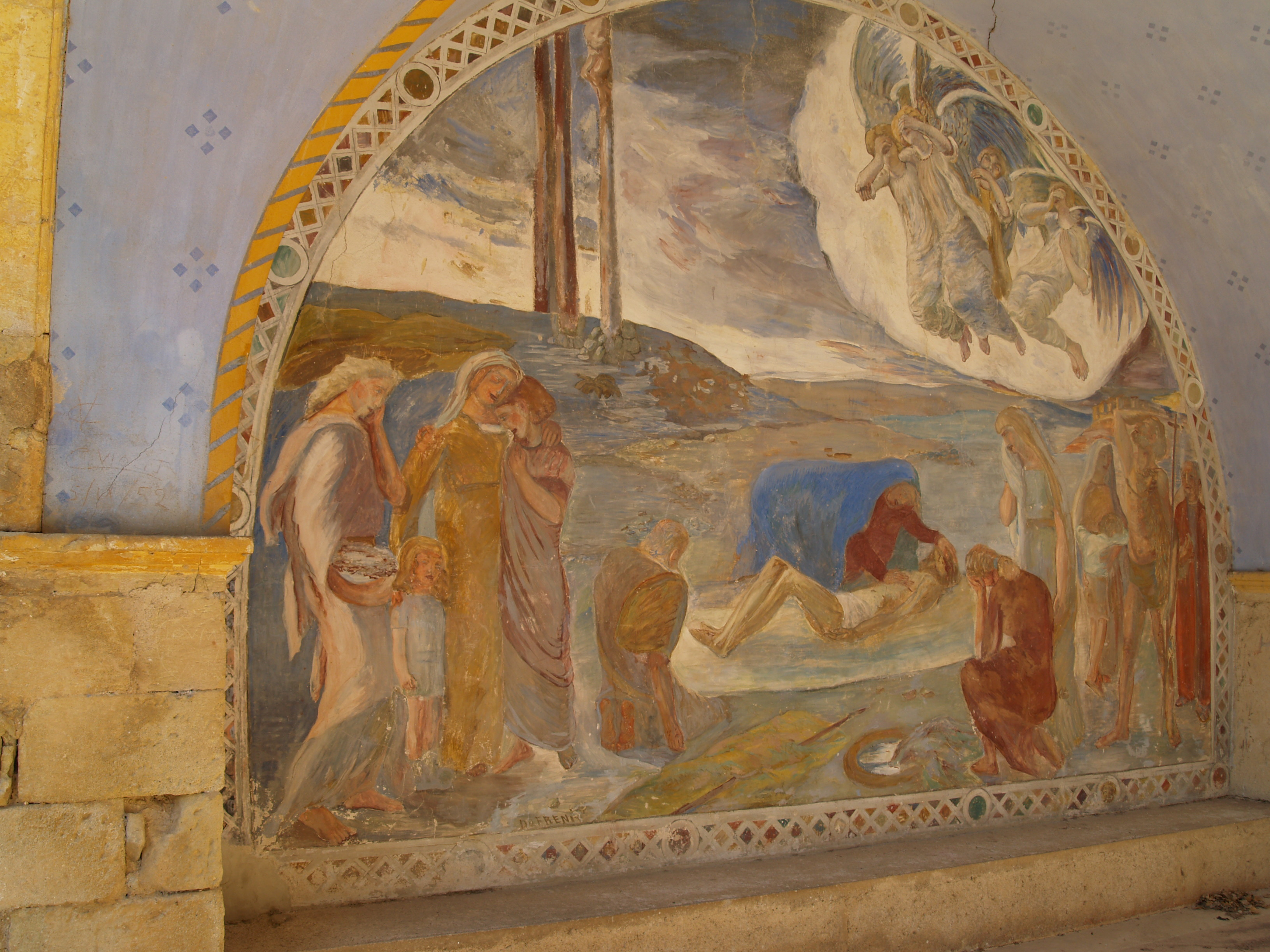 Fresque du porche de l'Ermitage Saint Pancrace - Piéta - Grambois